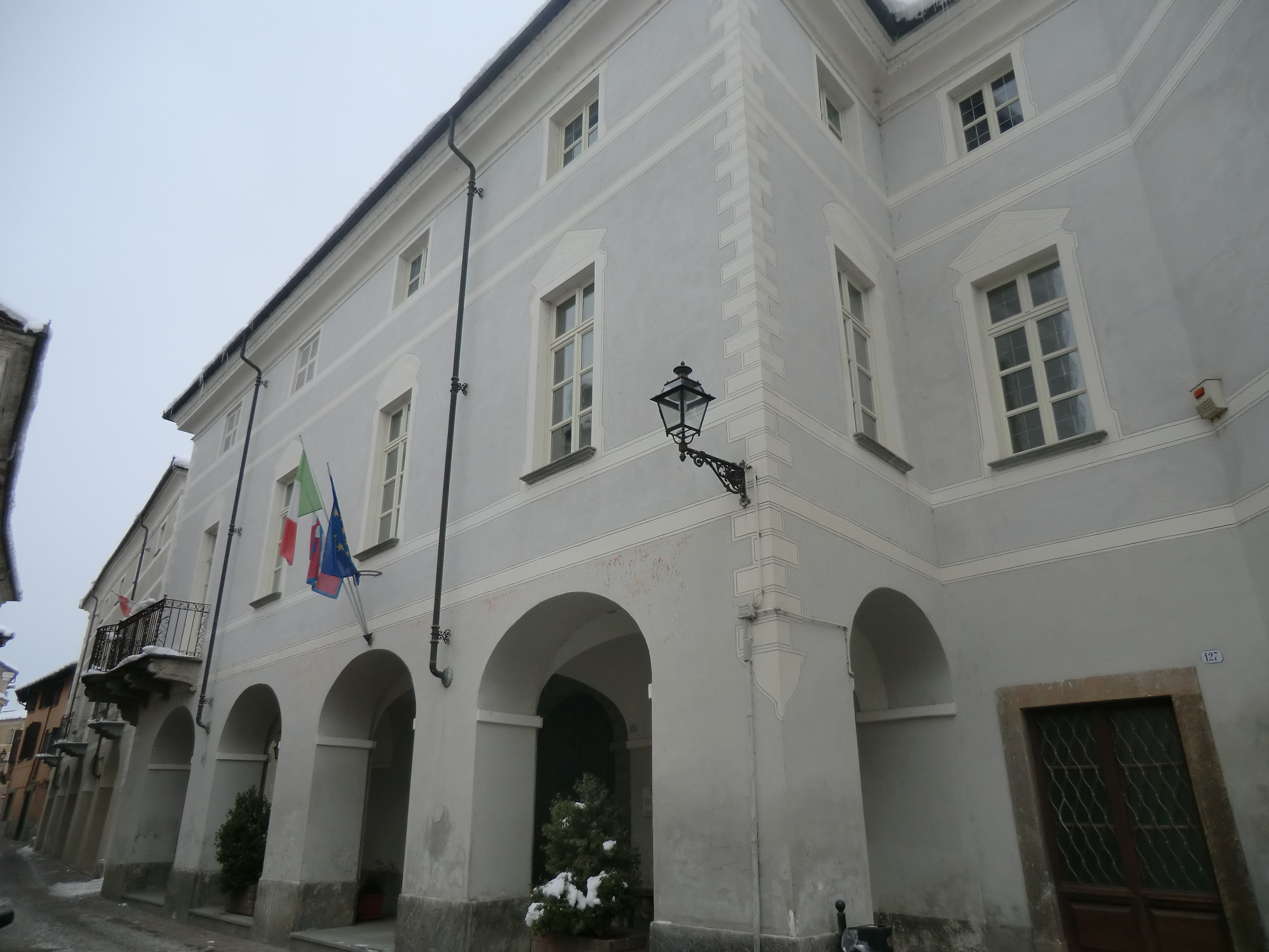 Bene Vagienna (Cuneo):Palazzo Lucerna di Rorà già Oreglia di Novello (sec. XVII)